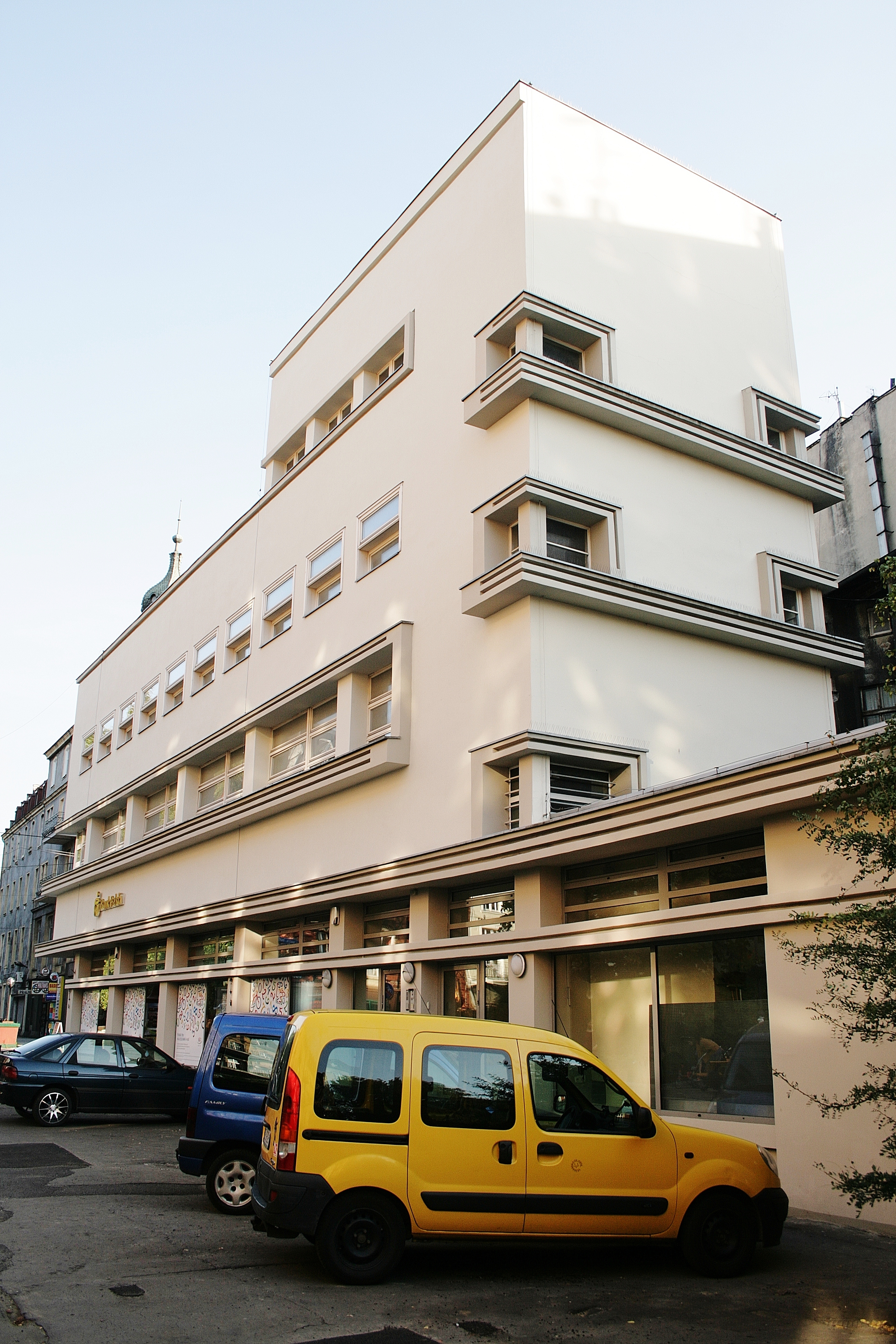 Gliwice, ul. Zwycięstwa 37 - kamienica z ok. 1930 r. dawny "Dom Tekstylny" Weichmanna (widok na główną i tylną elewację), obecnie bank (zabytek nr A/1376/88 z 27.09.1988)